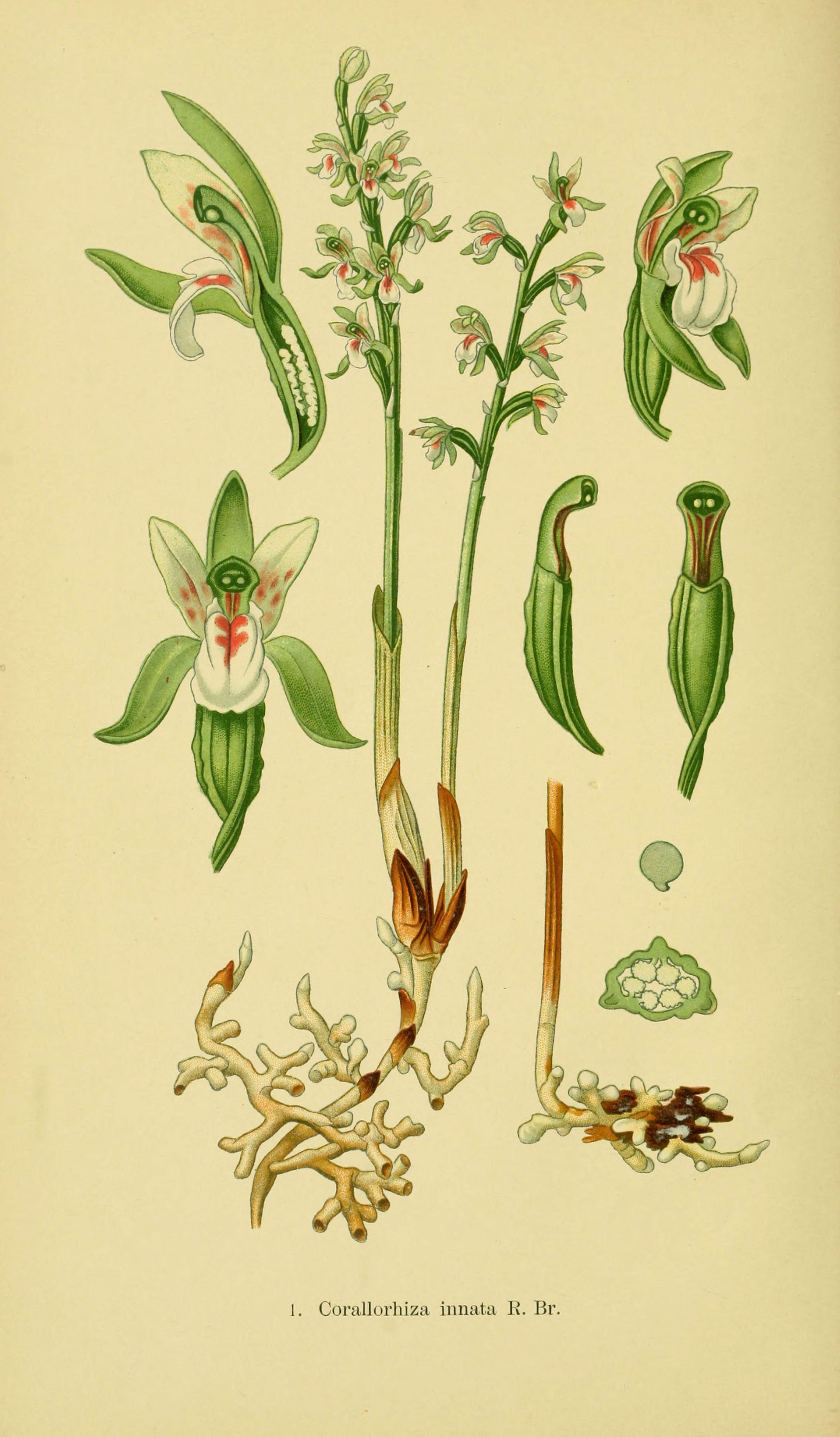 1. Corallorhiza innata R. Br.